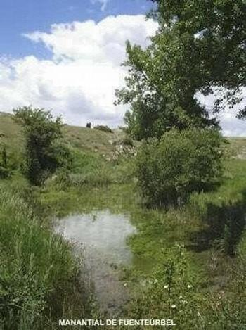 Imagen de Fuente Urbel